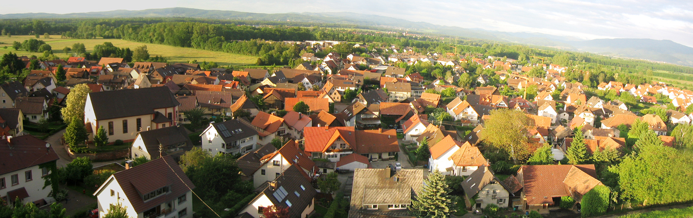 March-Holzhausen aus Süd-West